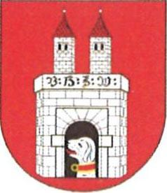 Nové Dvory, okres Kutná Hora, znak